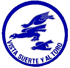 Emblema pintado sobre los aviones de la Patrulla Azul y luego utilizado pro diversas unidades de caza del Ejército del Aire español.